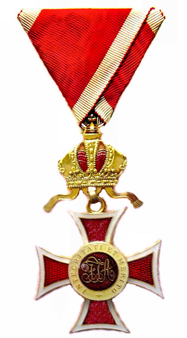 Kaiserlicher Leopoldorden (Österreich)